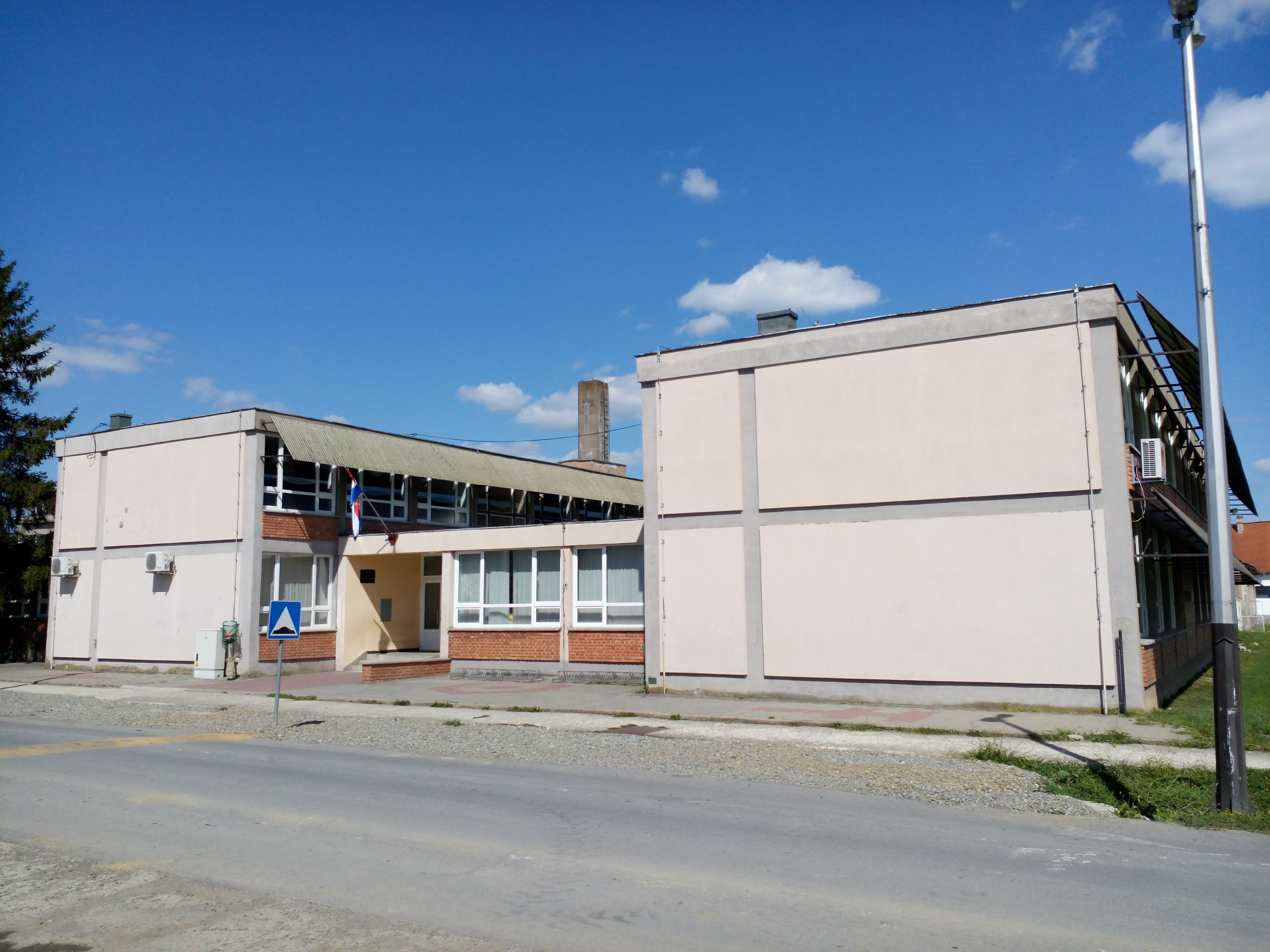 Osnovna škola Miroslava Krleže u Čepinu.